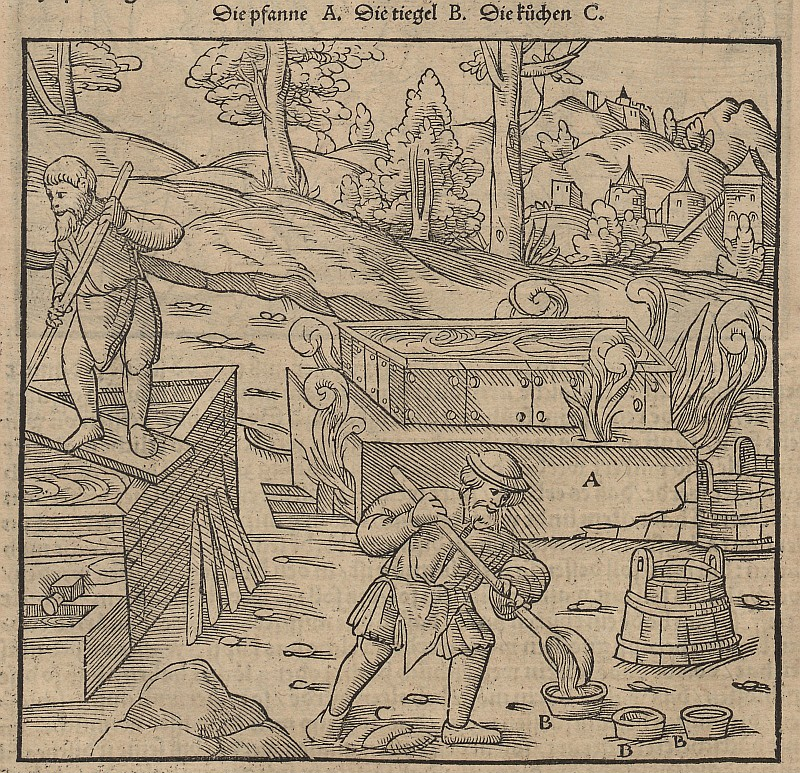 Original image description from the Deutsche Fotothek Bergwerk & Bergbau & Vitriolgwinnung & Vitriol